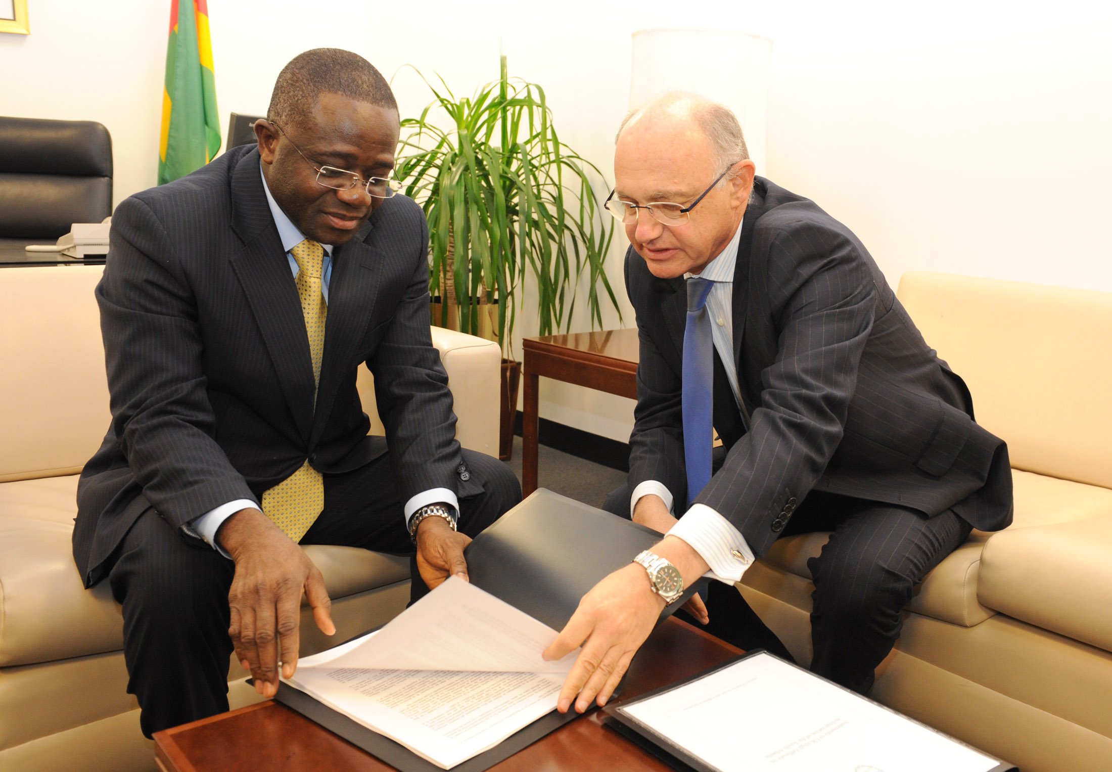 El canciller Héctor Timerman junto a Kodjo Menan, el presidente del Consejo de Seguridad de las Naciones Unidas en Nueva York